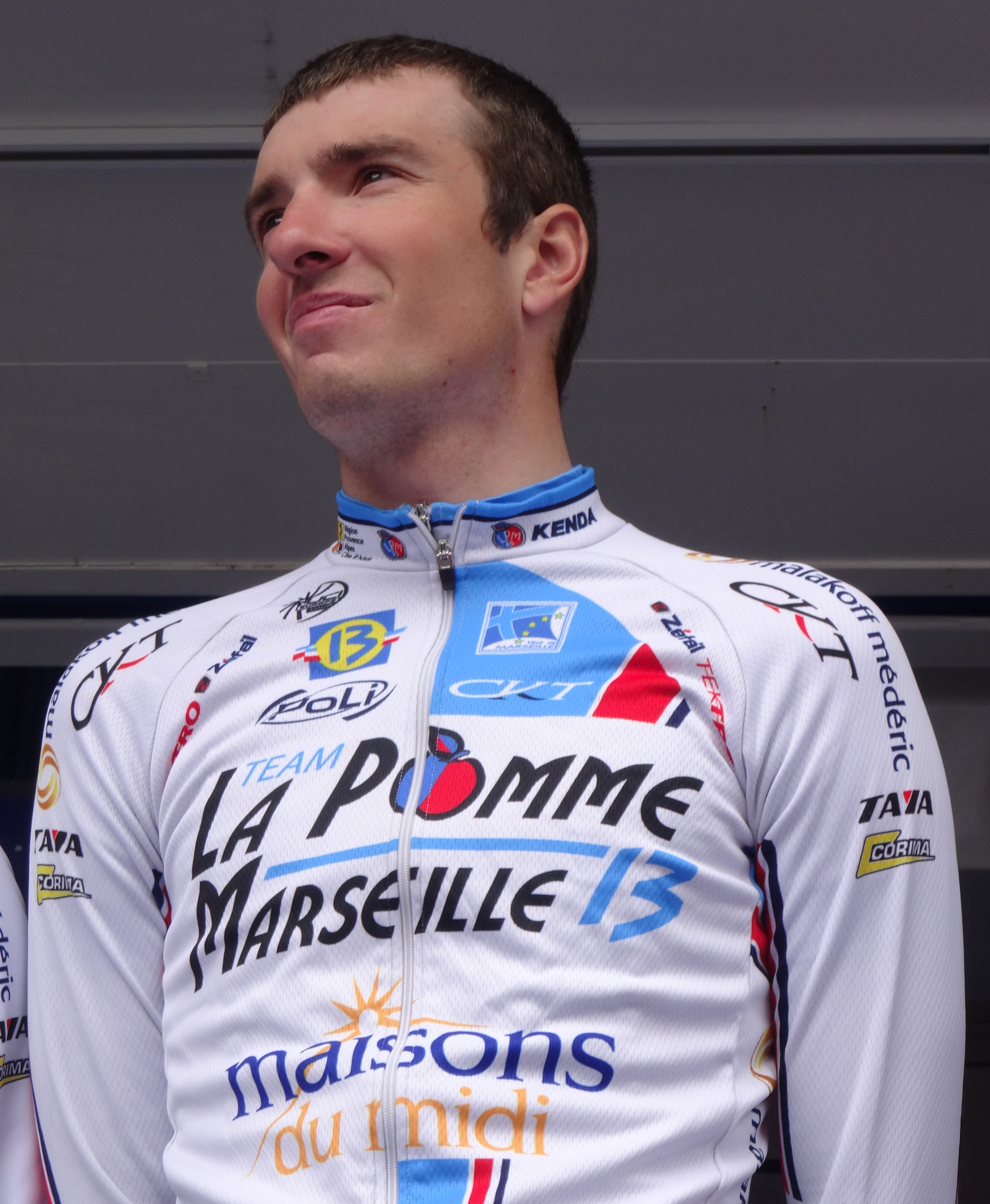 Reportage photographique réalisé le mercredi 7 mai 2014 au départ de la première étape de l'édition 2014 des Quatre jours de Dunkerque à Dunkerque, Nord, Nord-Pas-de-Calais, France. Depicted person: Yoann Paillot Depicted team: La Pomme Marseille 13